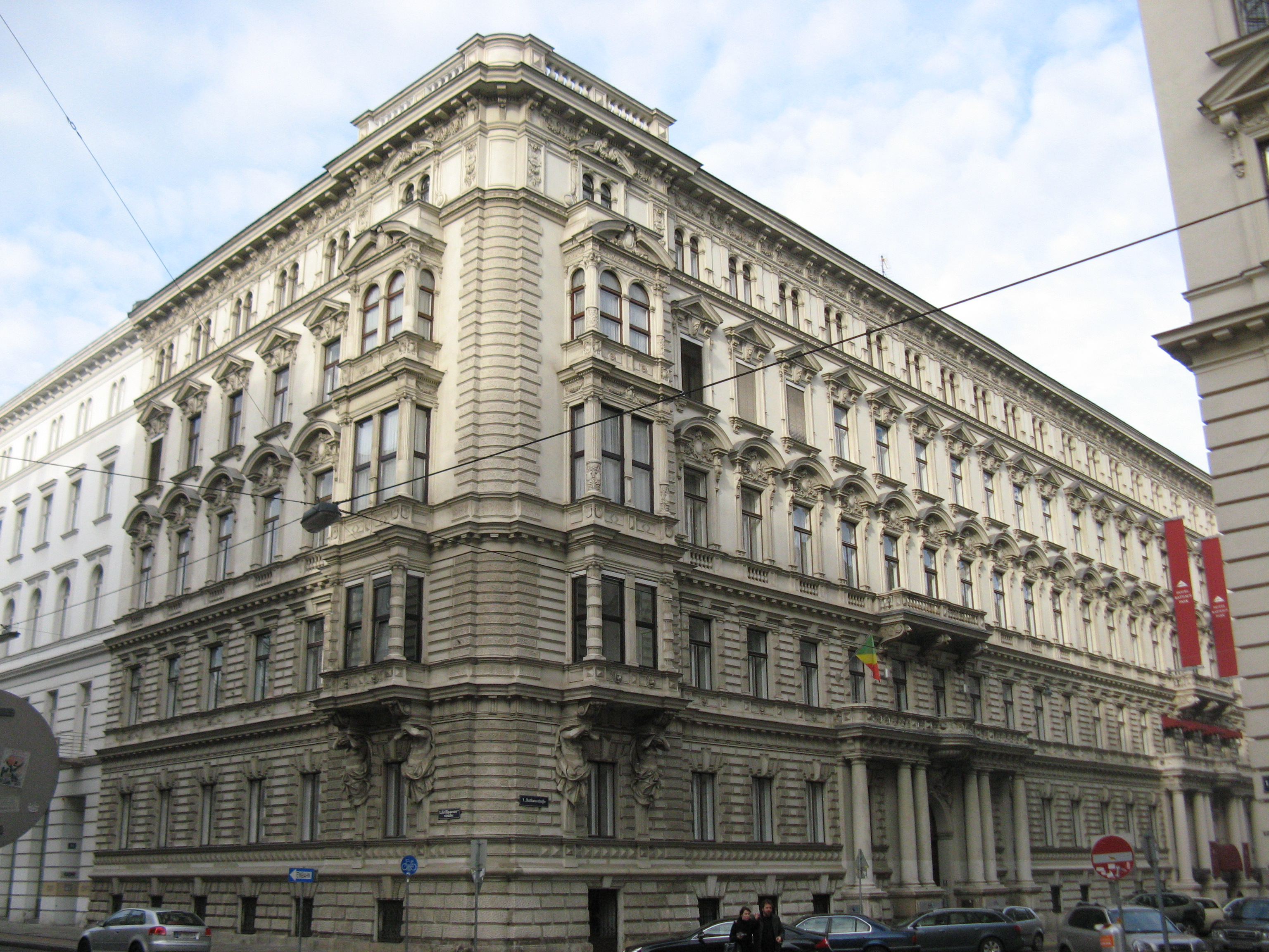 Ehemaliges Haus Königswarter (1881) von Wilhelm Stiassny, Rathausstraße 15-17, Wien-Innere Stadt